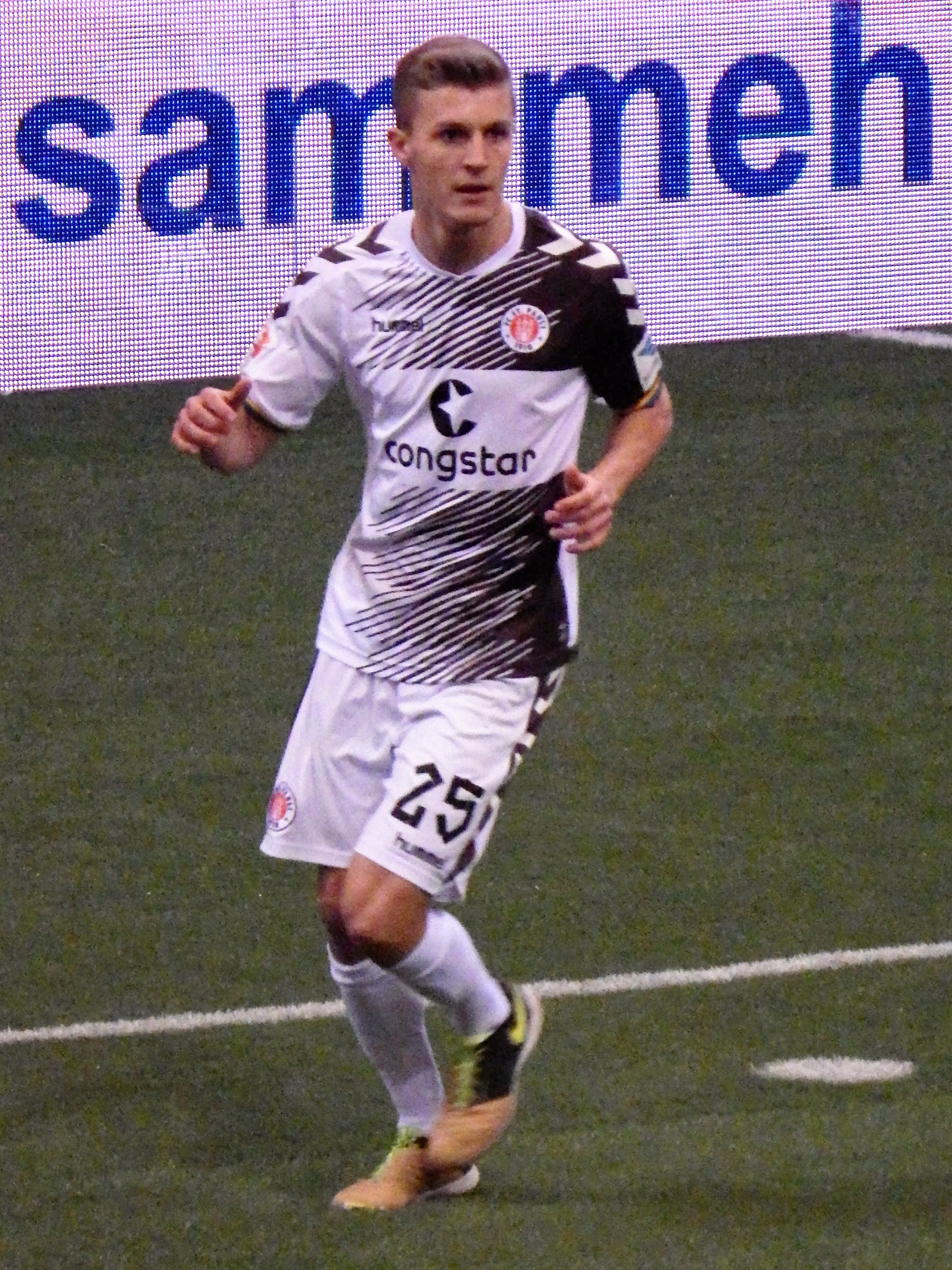 Rosin, Dennis FCSP 15-16